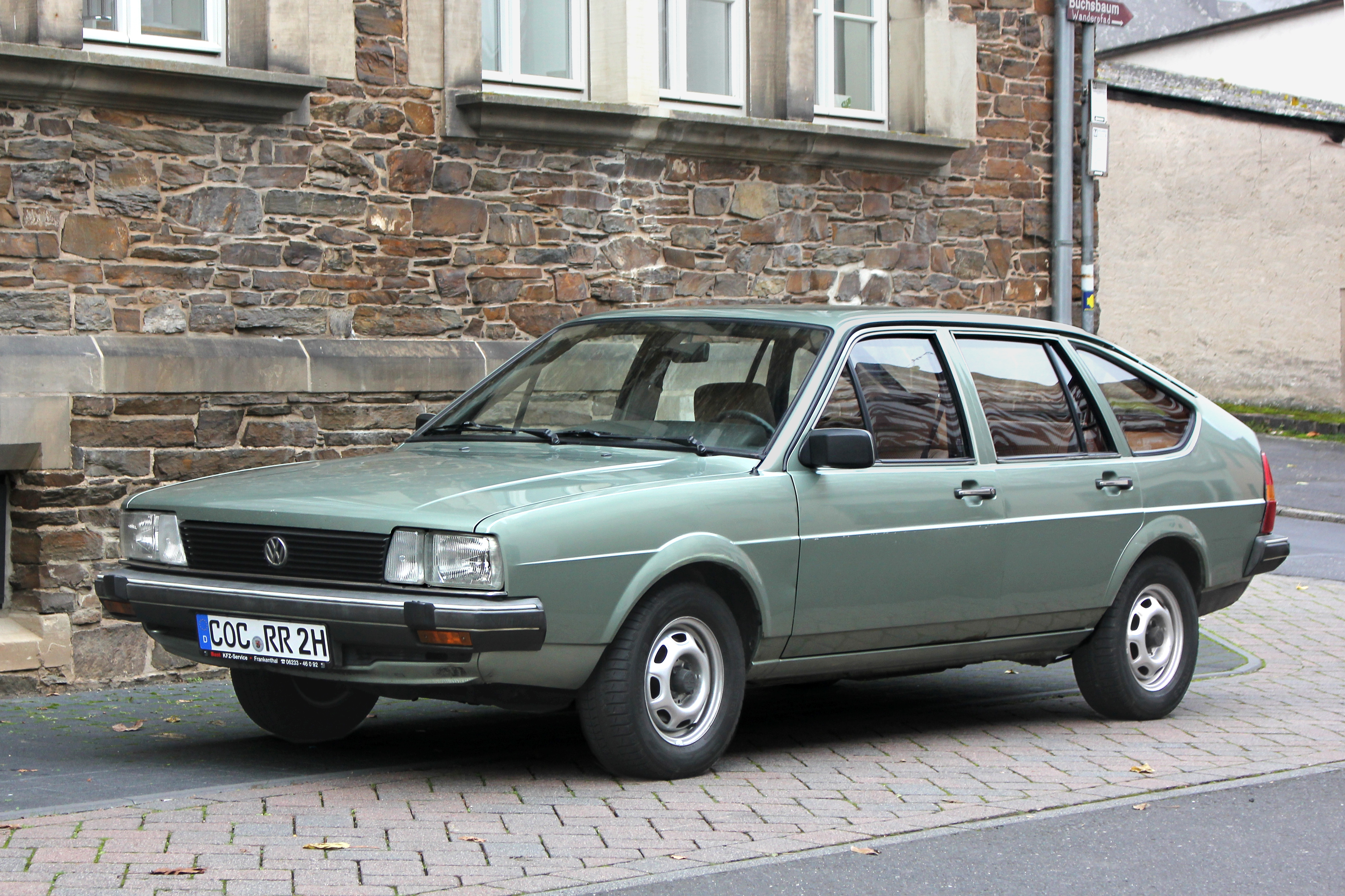 VW Passat GL, B2, Bauzeit 1980 bis 1985